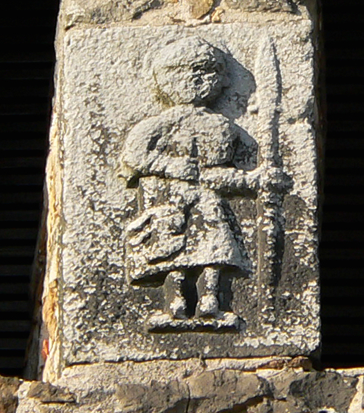 Steinrelief an Kirche in Petzen